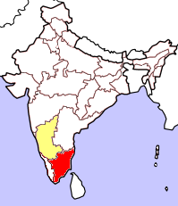 Kartorna bygger på resultat i senaste delstatsval (Juni 2004). Rött betyder att partiet deltar i delstatsregeringen, orange att partiet vann mandat i senaste delstatsvalet och gult att partiet hade lanserat kandidater men utan att vinna mandat. Kartorna tar inte hänsyn till avhopp, partifusioner och fyllnadsval under den ordinarie mandatperiodens gång.